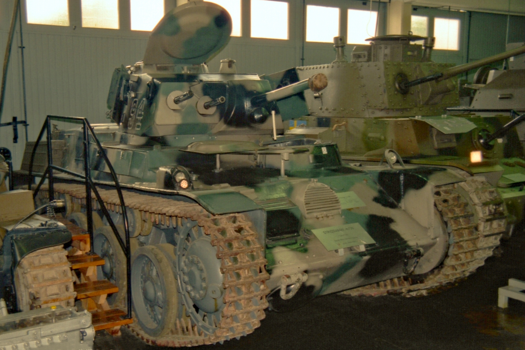 Stridsvagn m/39 i Pansarmuseet Axvall 31.05.2000